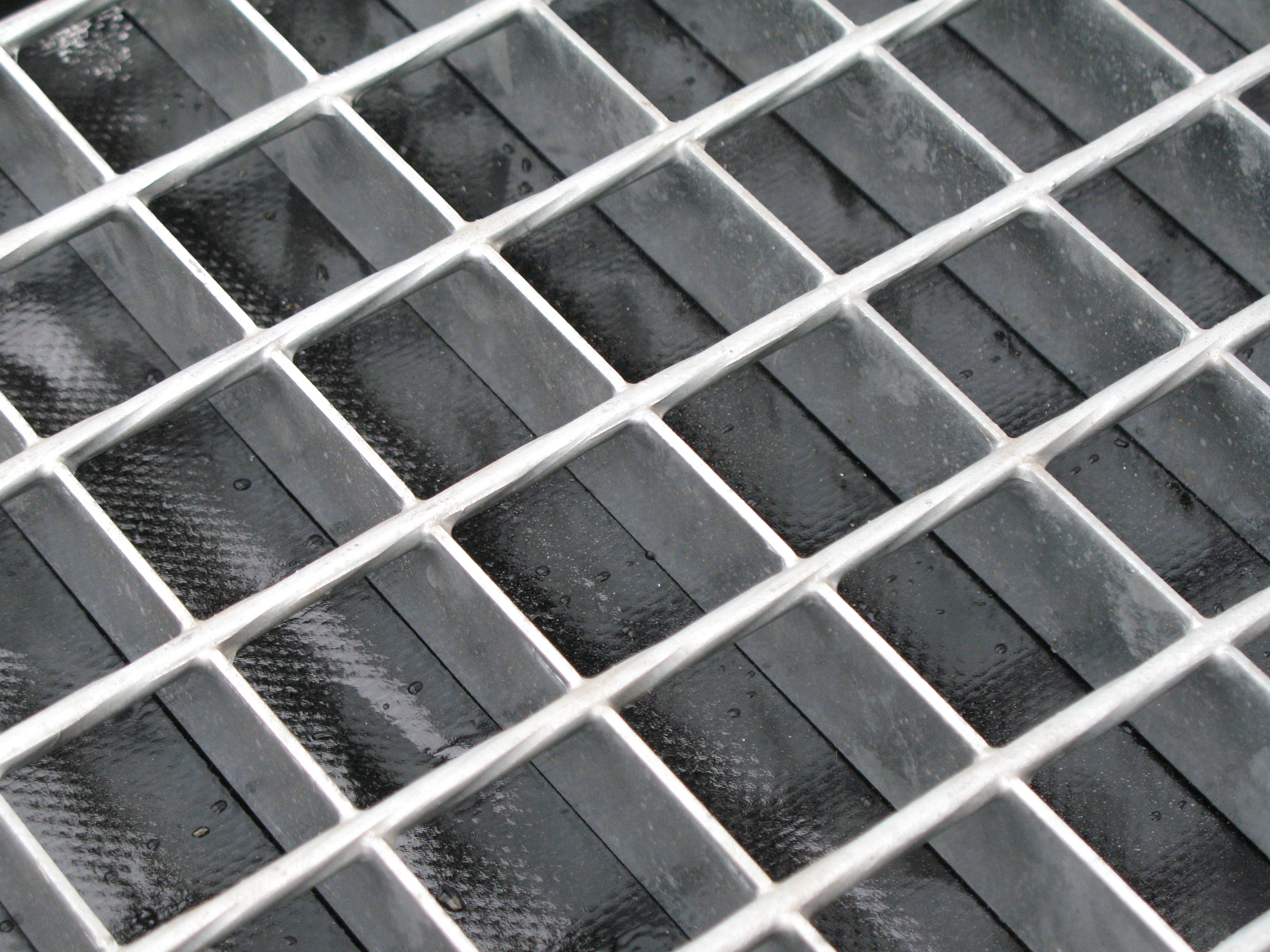 Сварной настил с ячейкой 34х38